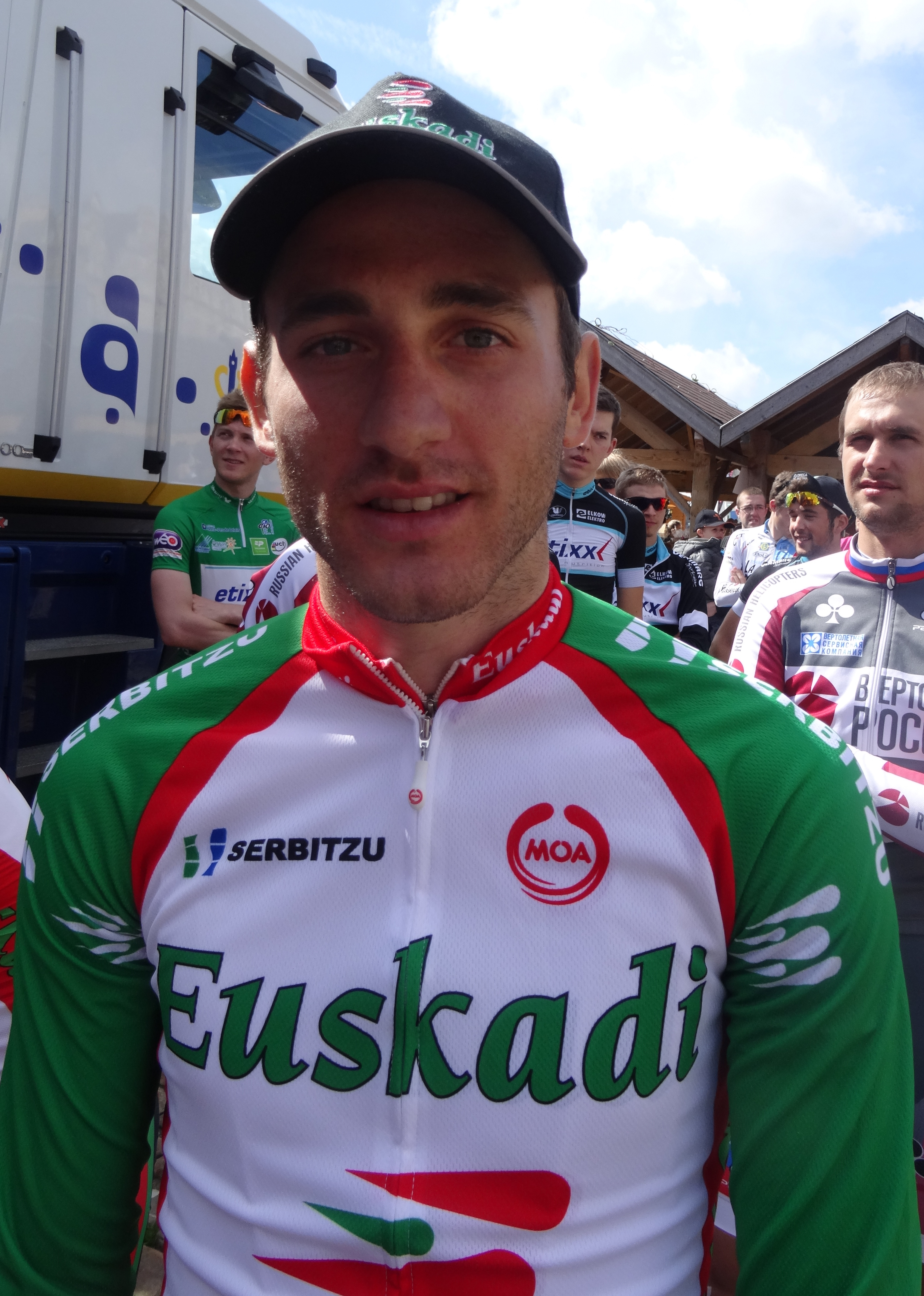 Reportage photographique réalisé le dimanche 25 mai 2014 à l'occasion du départ et de l'arrivée de la troisième étape du Paris-Arras Tour 2014 à Arras, Pas-de-Calais, Nord-Pas-de-Calais, France. Depicted person: Carlos Barbero Depicted team: Euskadi